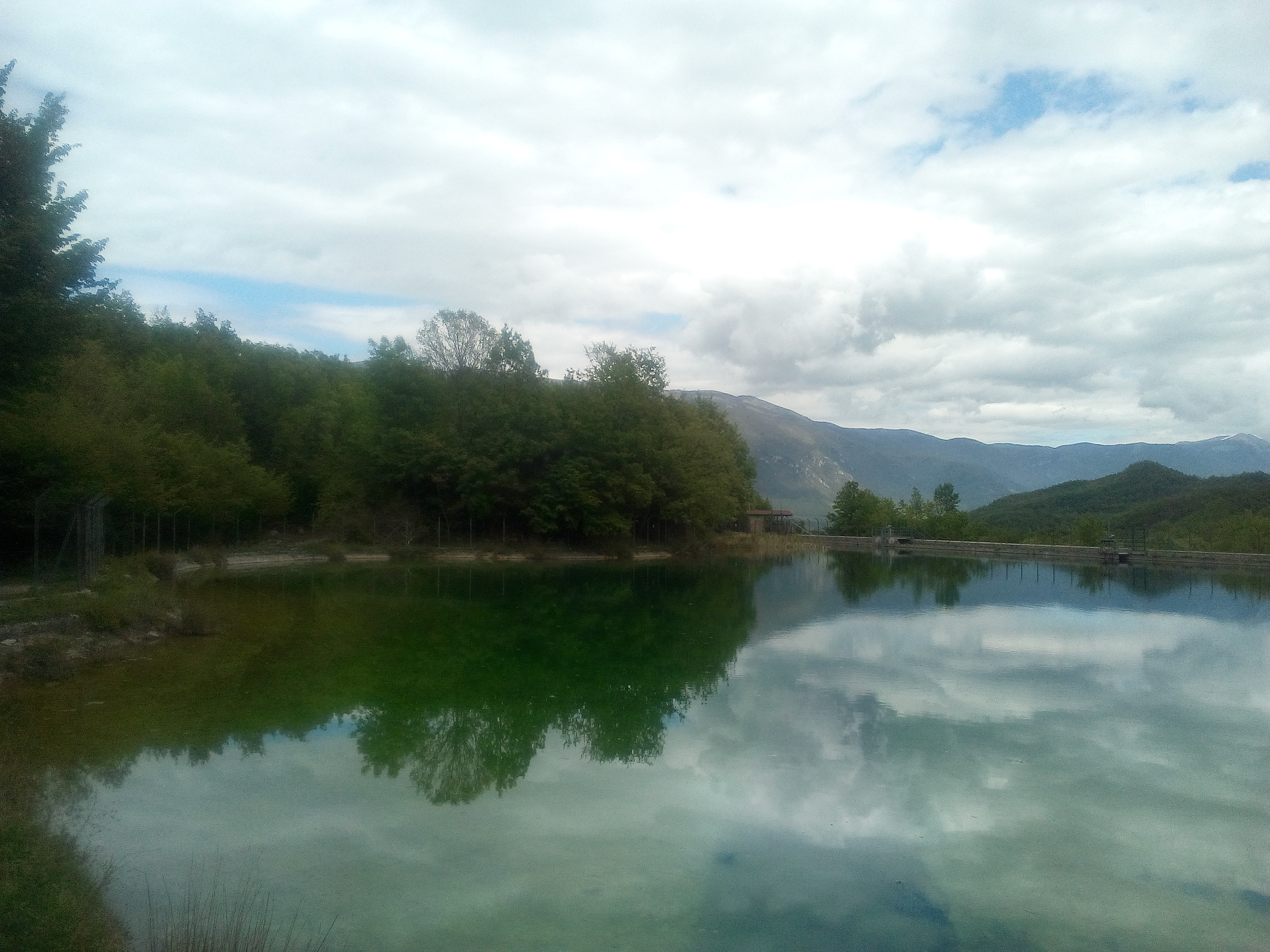 Laghetto di Morino in Abruzzo